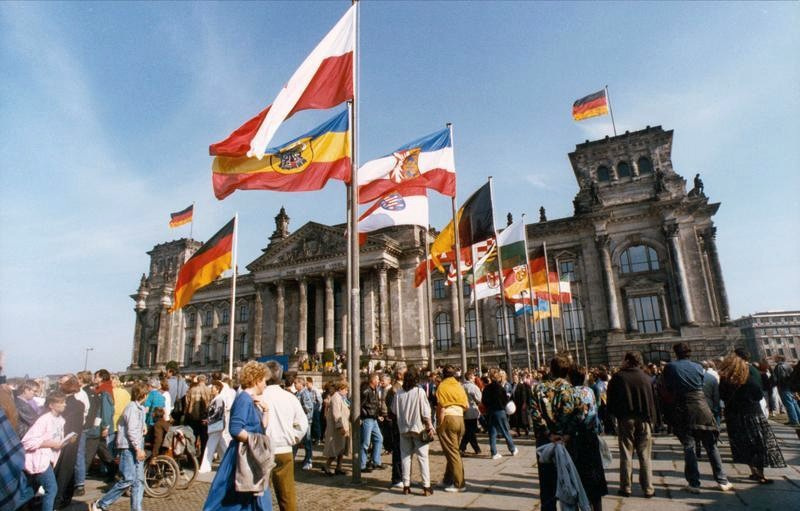 Berlin, Flaggen vor dem Reichstag ADN-ZB/Uhlemann/3.10.90/Berlin: Vereinigung/Um die schwarz-rot-goldene Fahne gruppieren sich vor dem Reichstagsgebäude die Fahnen aller Bundesländer Deutschlands.